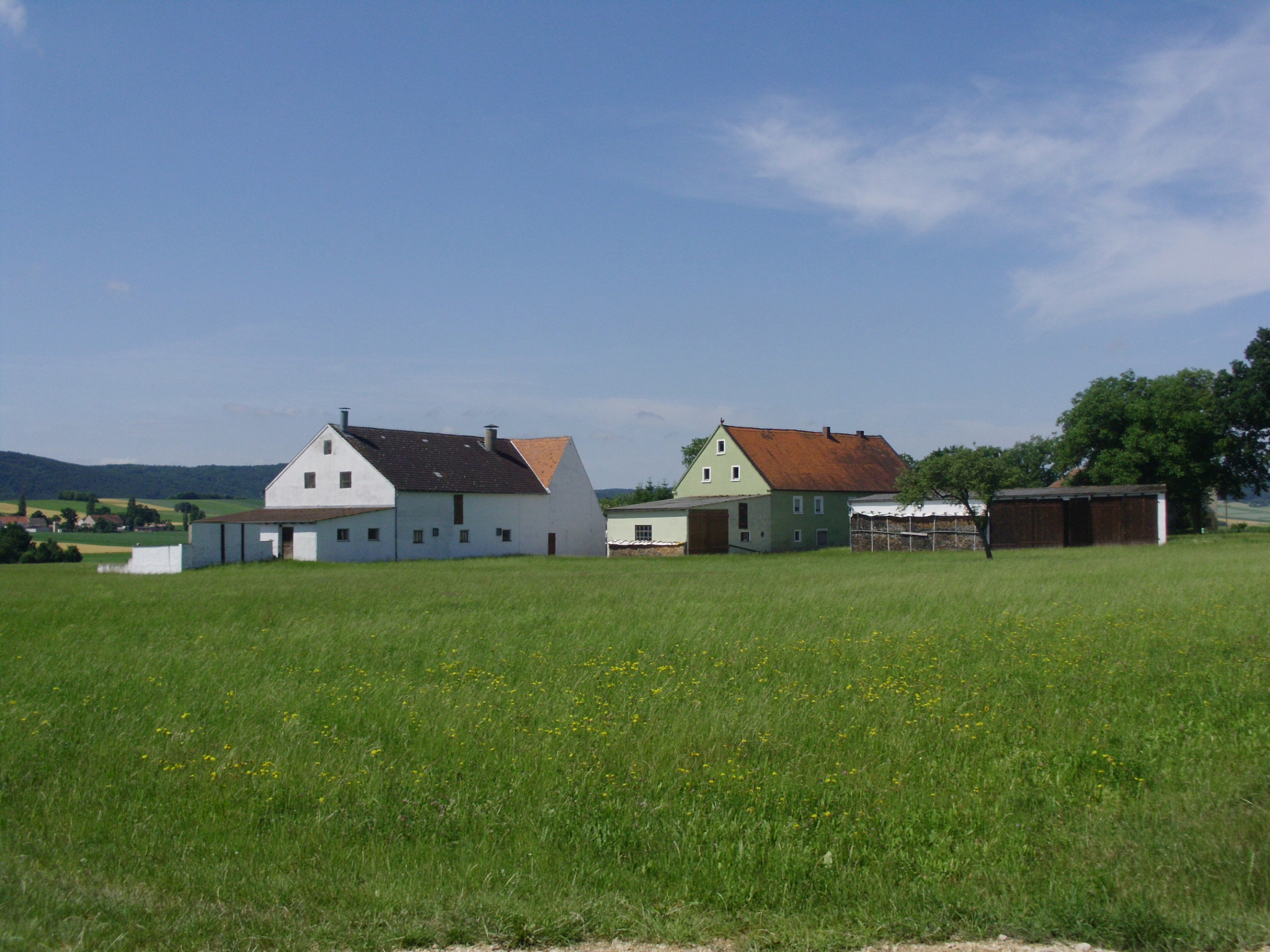 Neuheim, Ortsteil von Treuchtlingen im mittelfränkischen Landkreis Weißenburg-Gunzenhausen